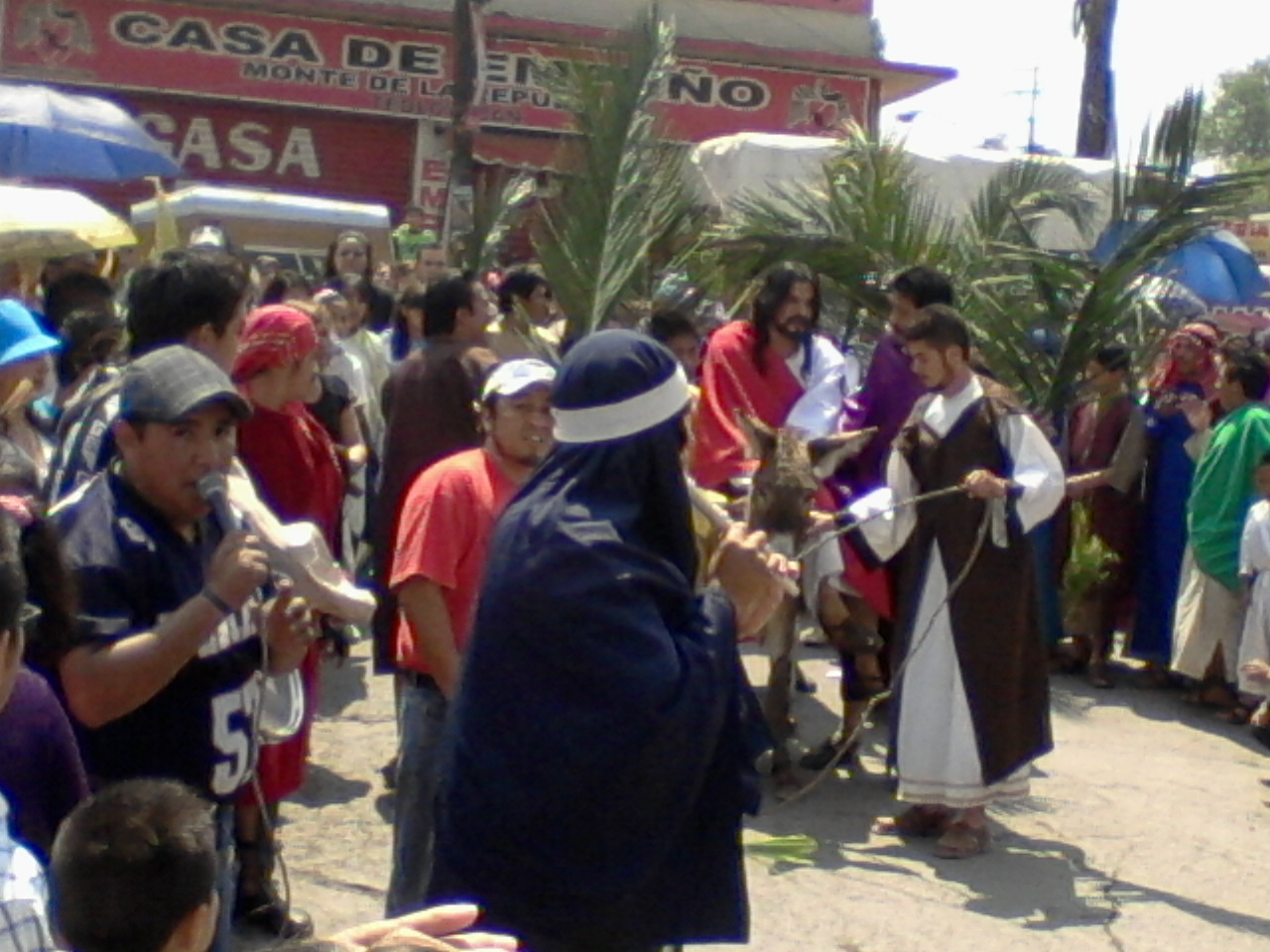 Representacion del domingo de ramos que se realiza año con año